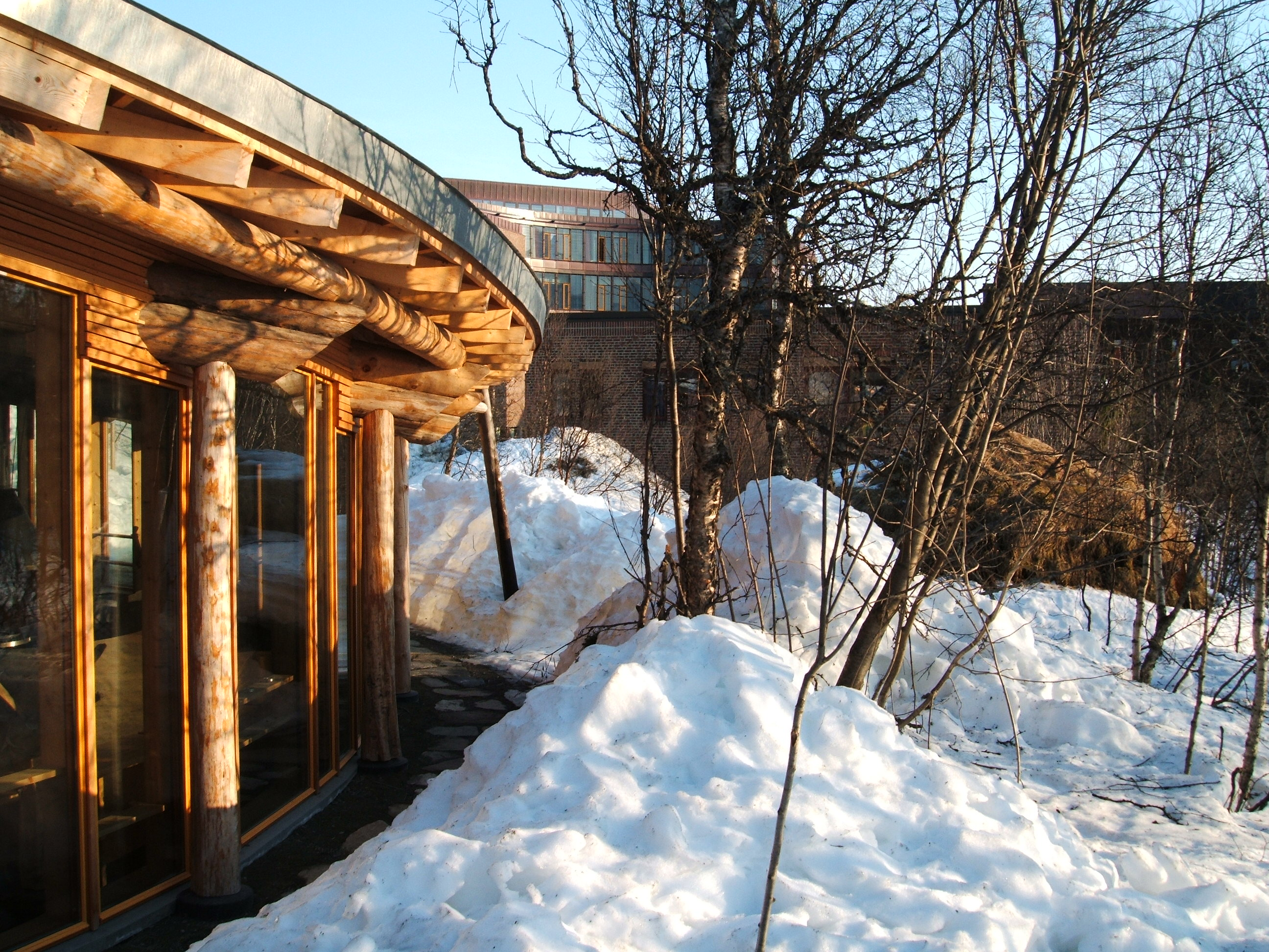 Ardna v/ Senter for samiske studier, Universitetet i Tromsø